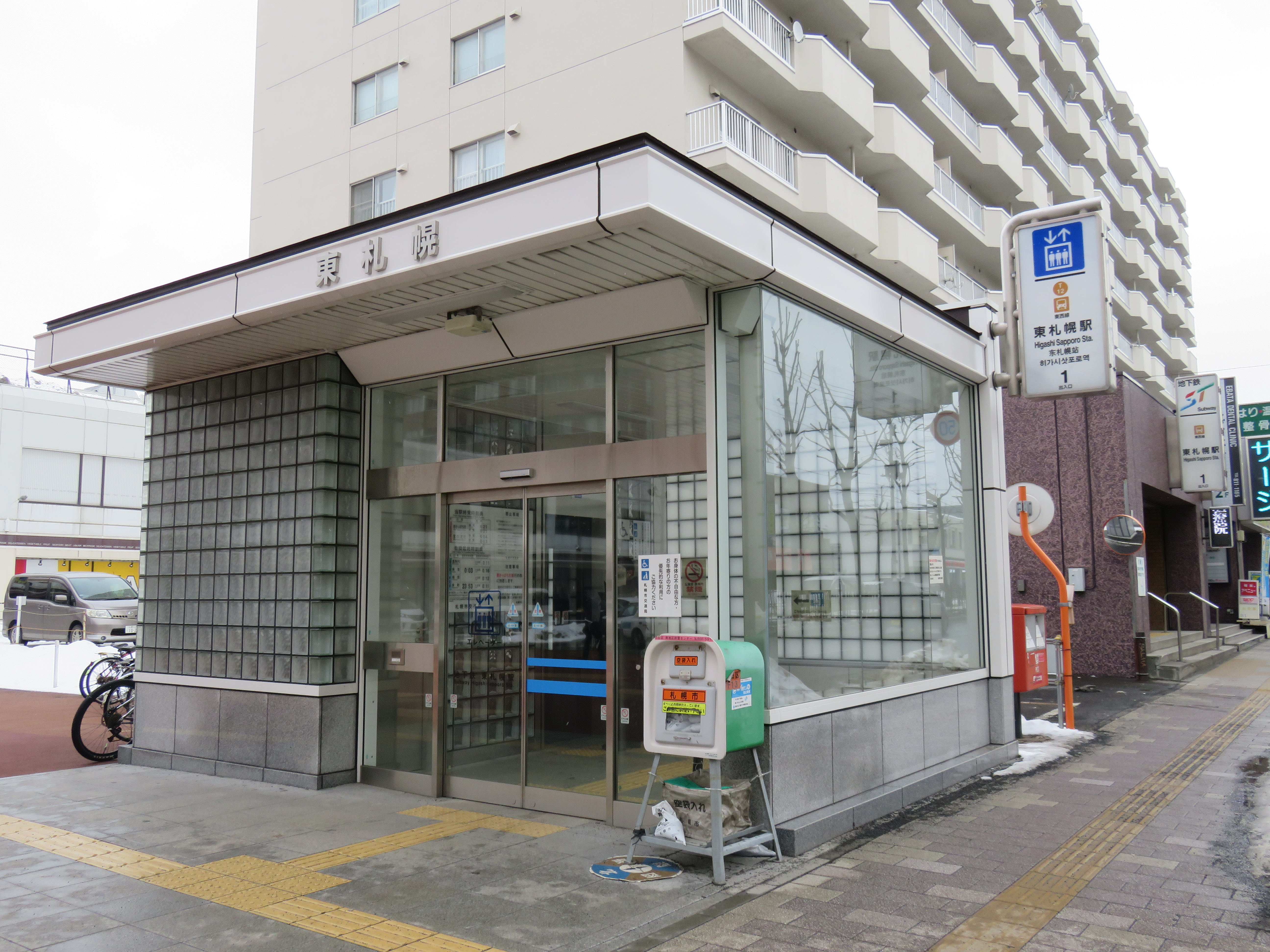 東札幌駅1番出入口